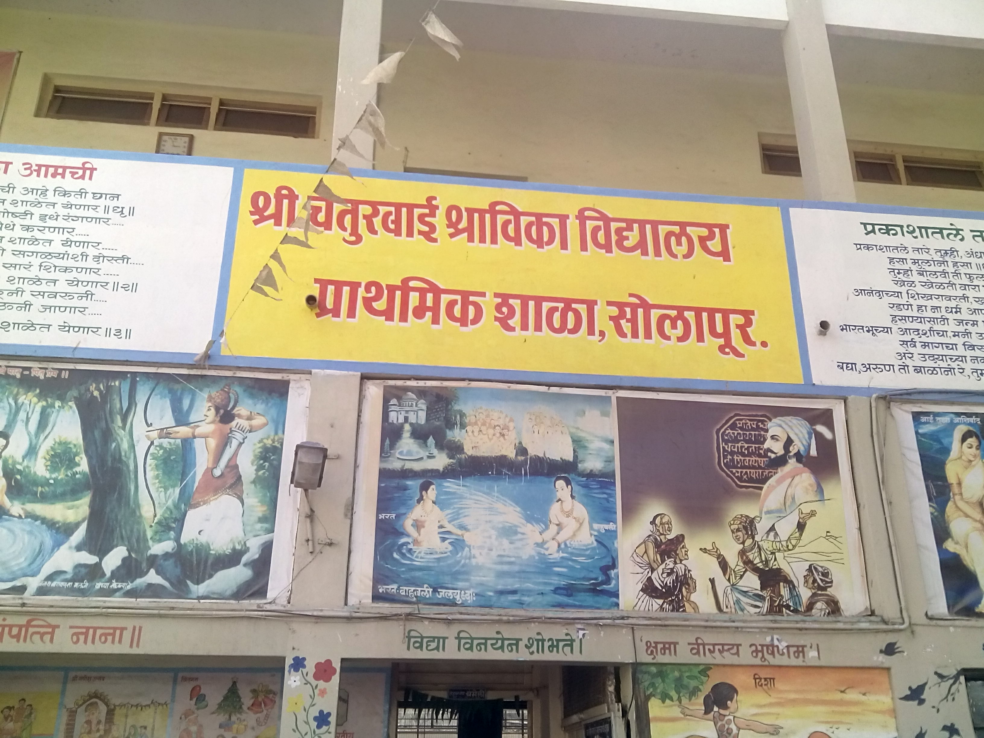 श्राविका आश्रम संस्था १